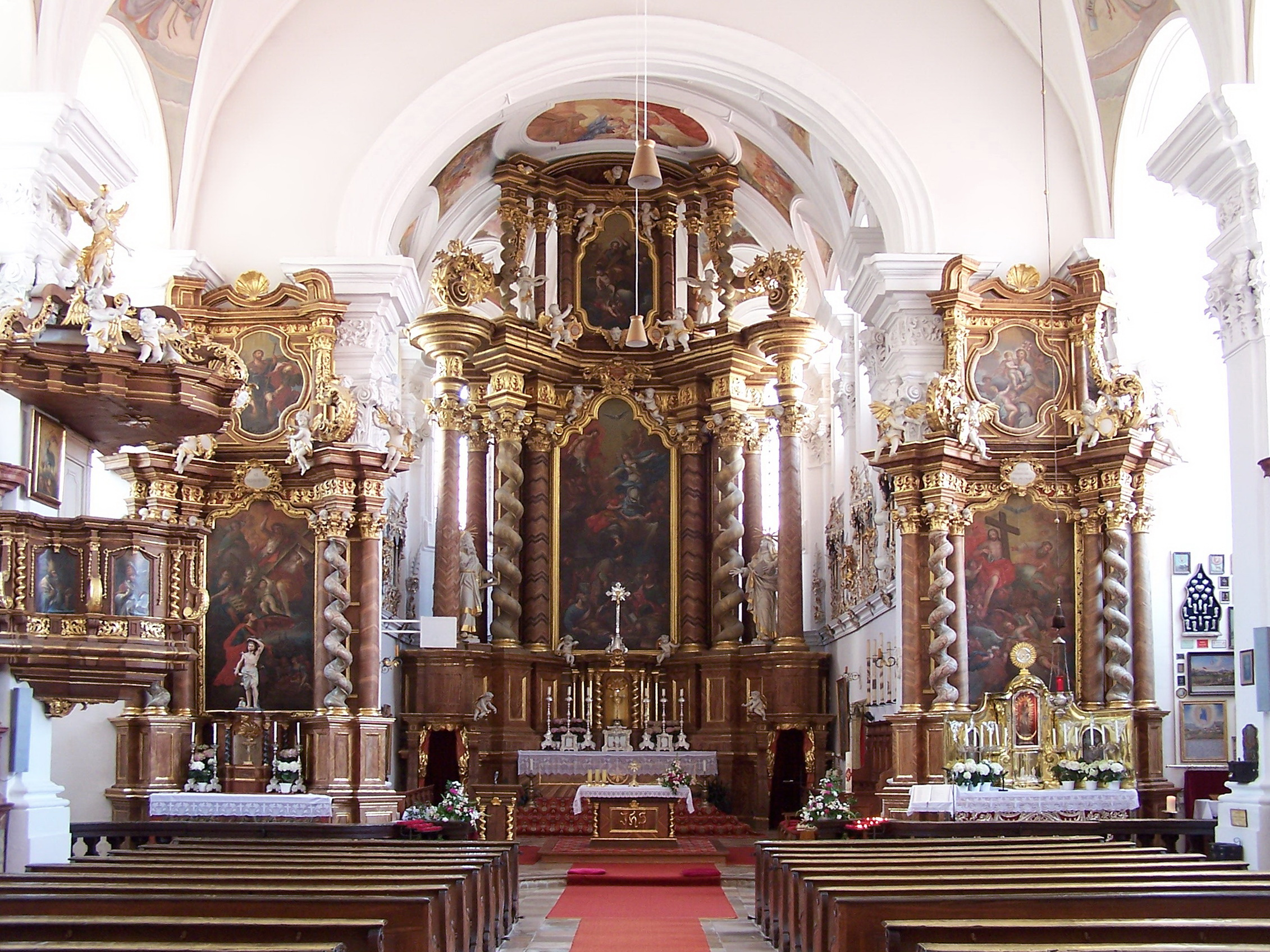 Geiselhöring, Haindling 16a, Katholische Wallfahrtskirche Mariä Himmelfahrt, Innenraum